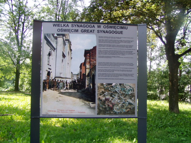 Great Synagogue in Oświęcim